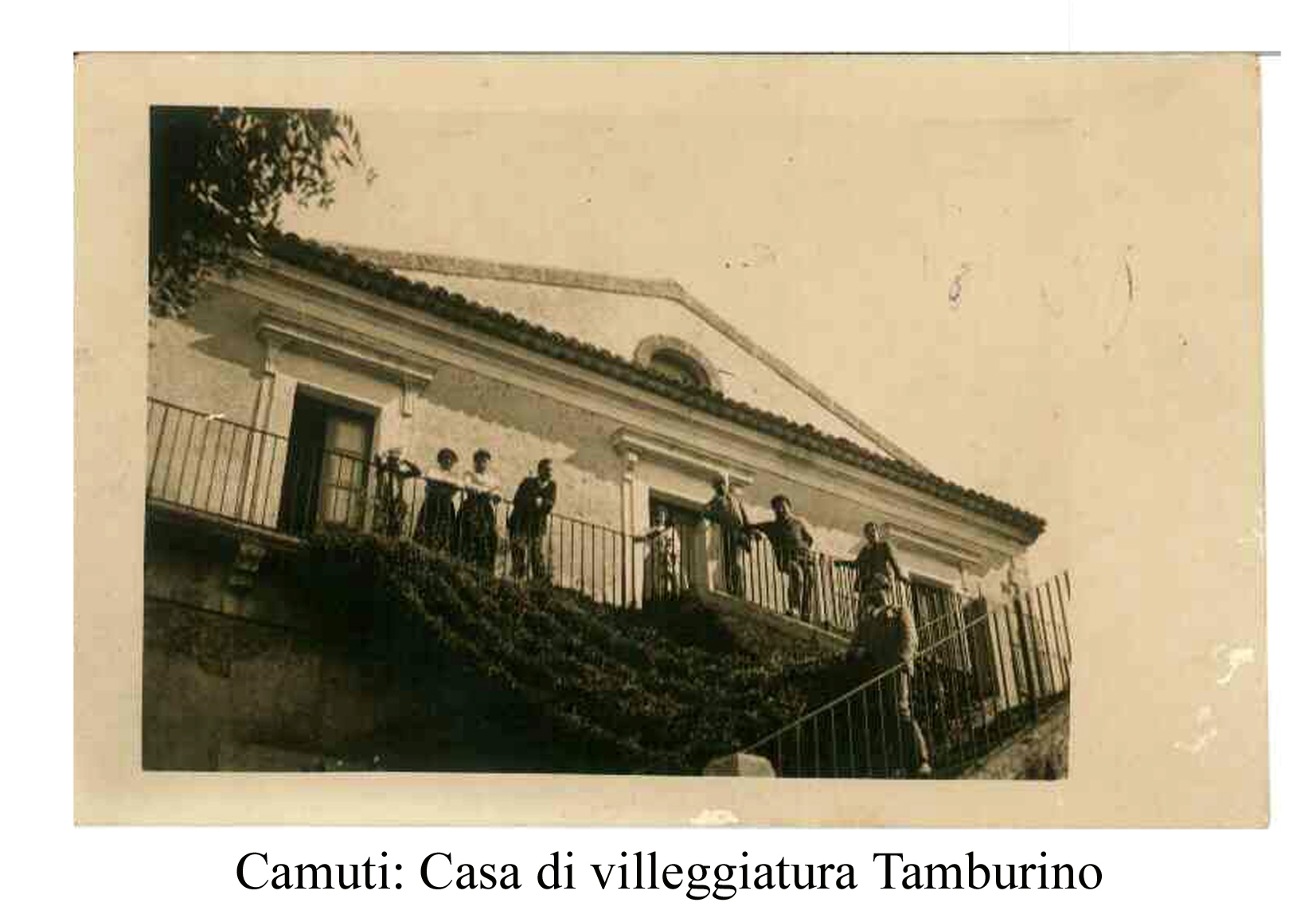 Casa di villegiatura Camuti